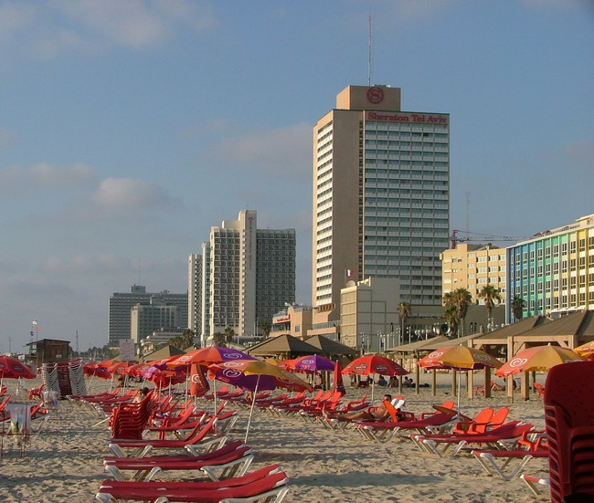 מלונות לאורך החוף רישיון צולם על ידי משתמש:אסף